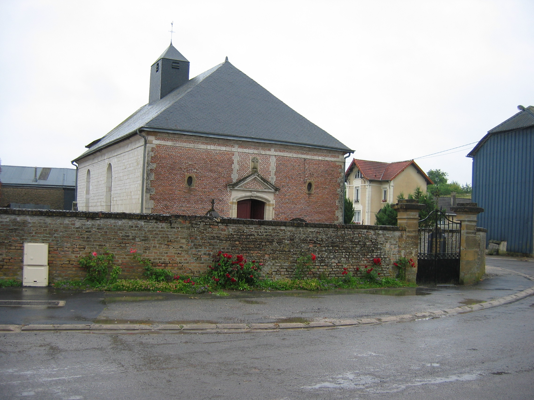 Eglise Bertoncourt Ardennes France